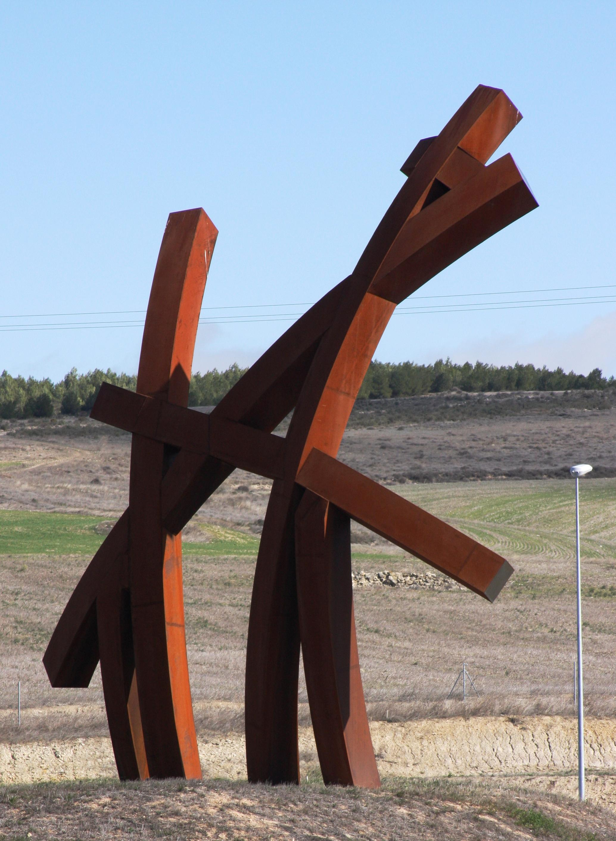 Simbolos de Camino de Santiago